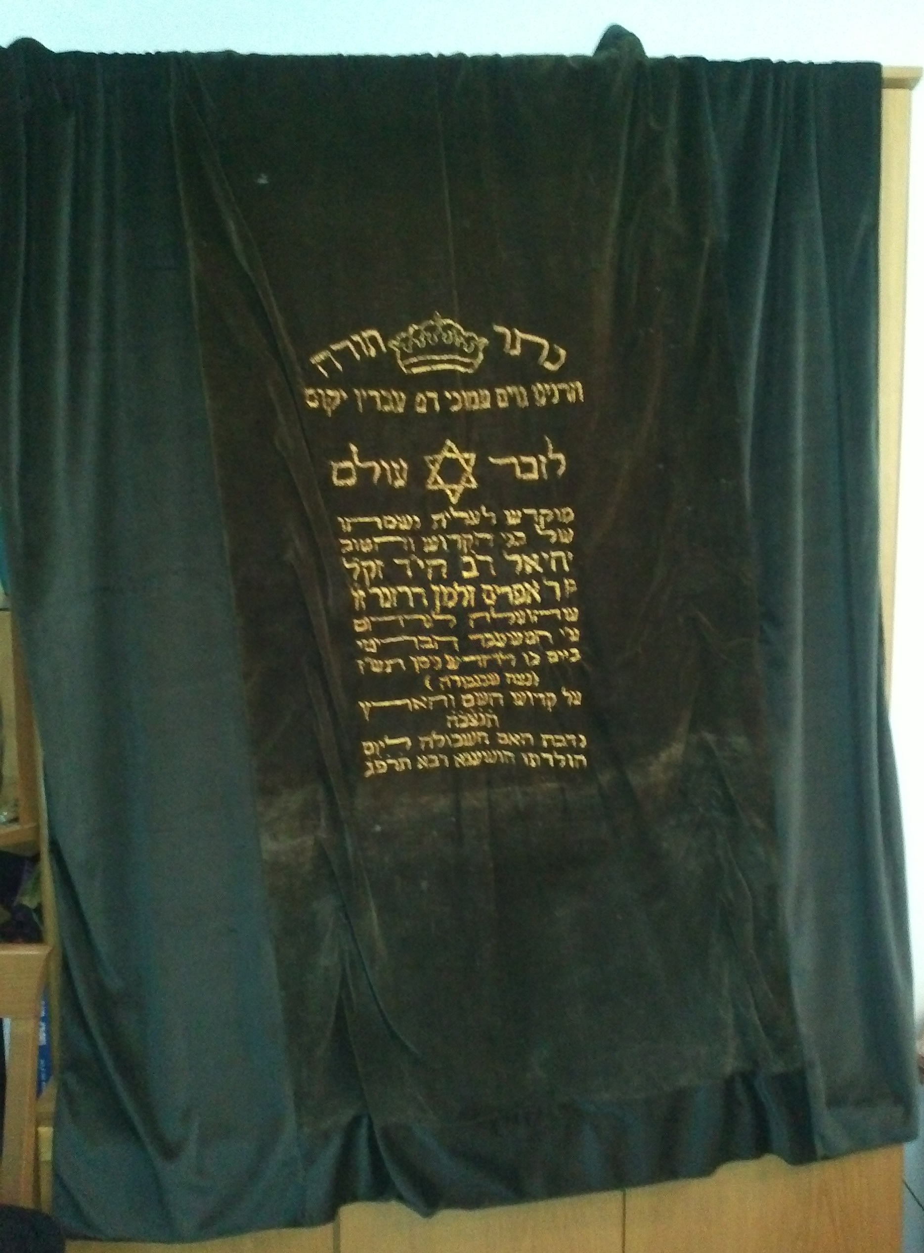 פרוכת שתרמה יפה דרזנר, אמו של עולה הגרדום יחיאל דרזנר, לעילוי נשמת נה